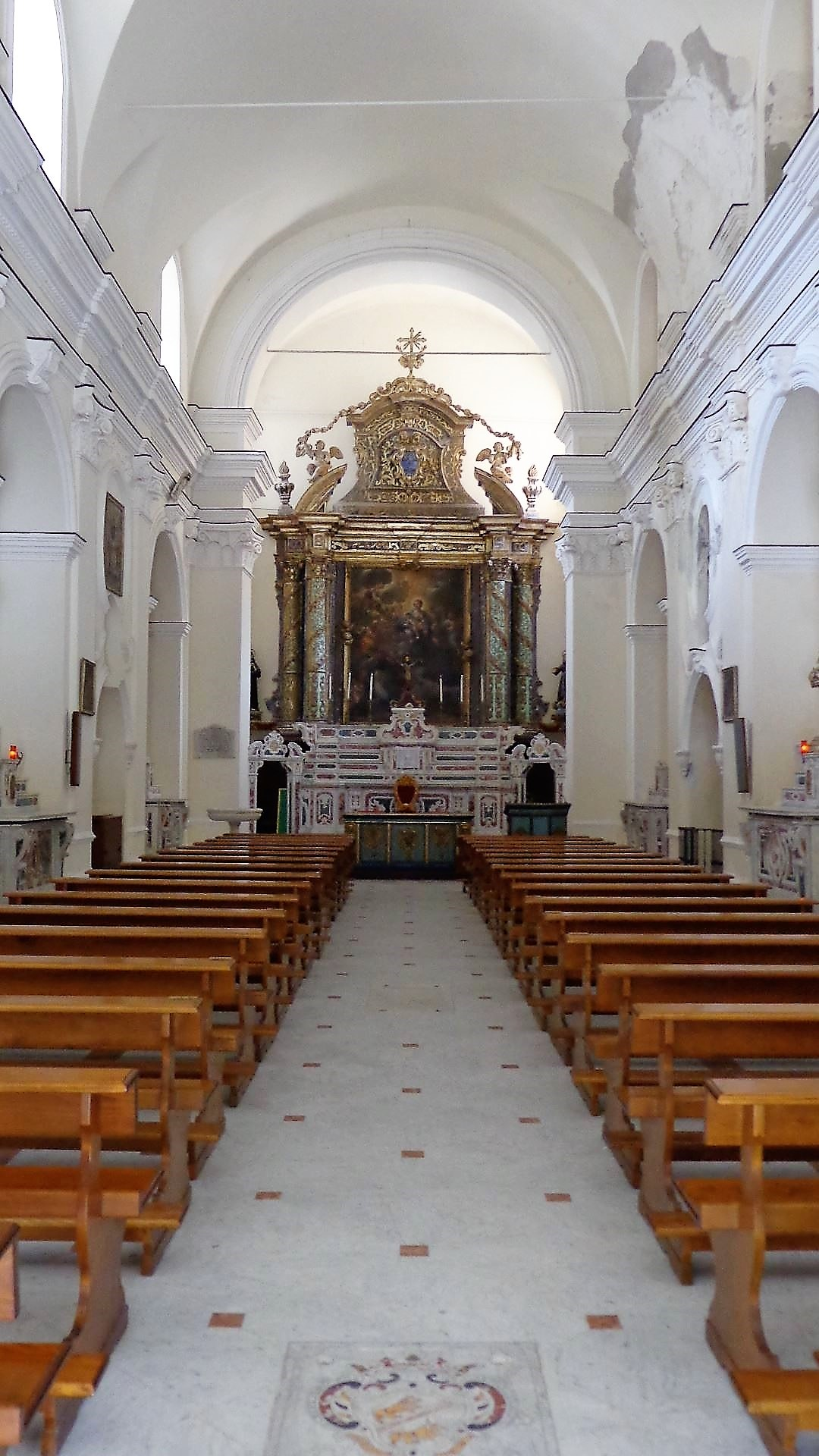 Interno chiesa di Sant'Antonio di Padova. Foto altresì presente siti personali e archivio FB.